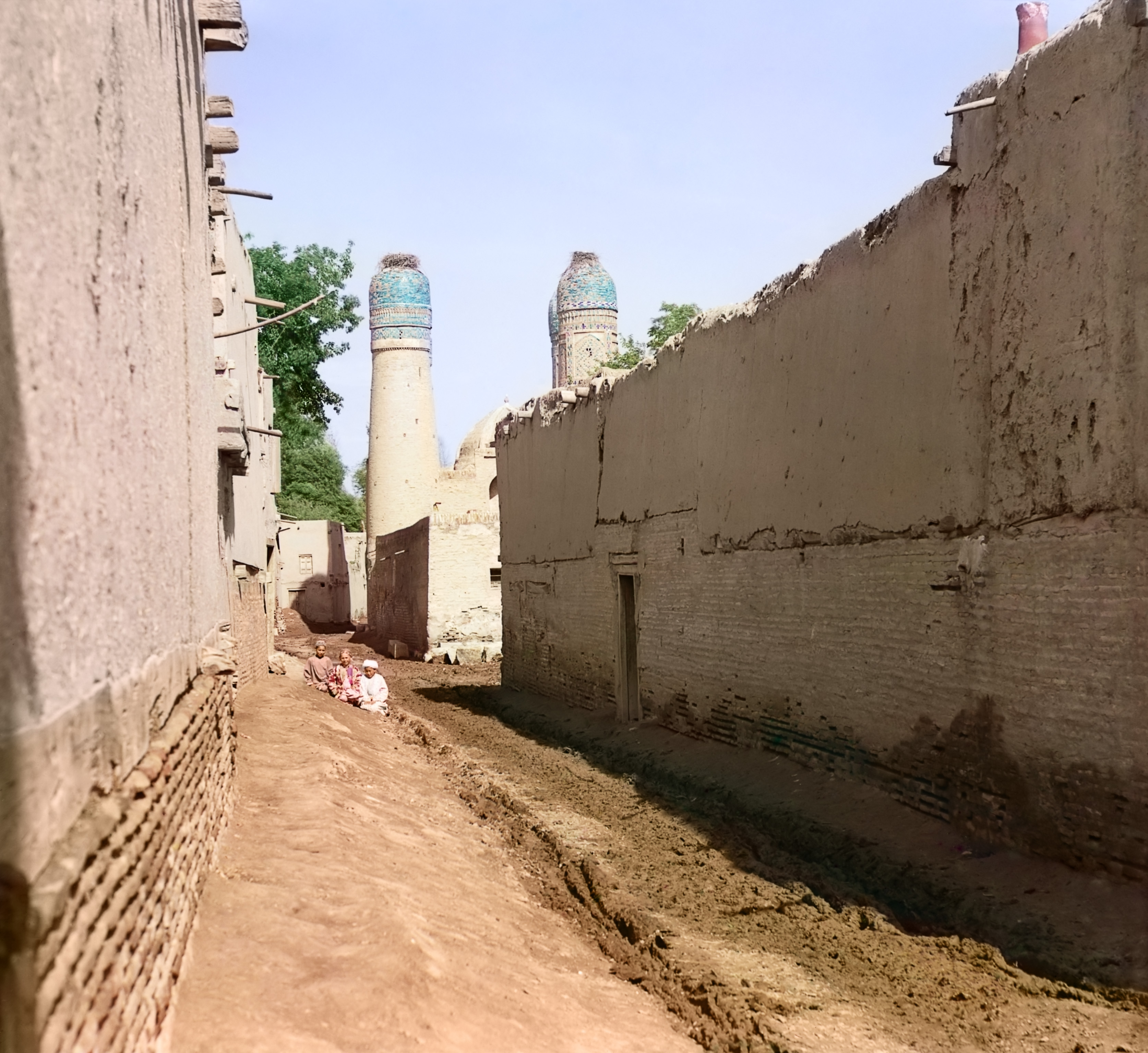 Улица в Бухаре. Впереди - Чар-Минор